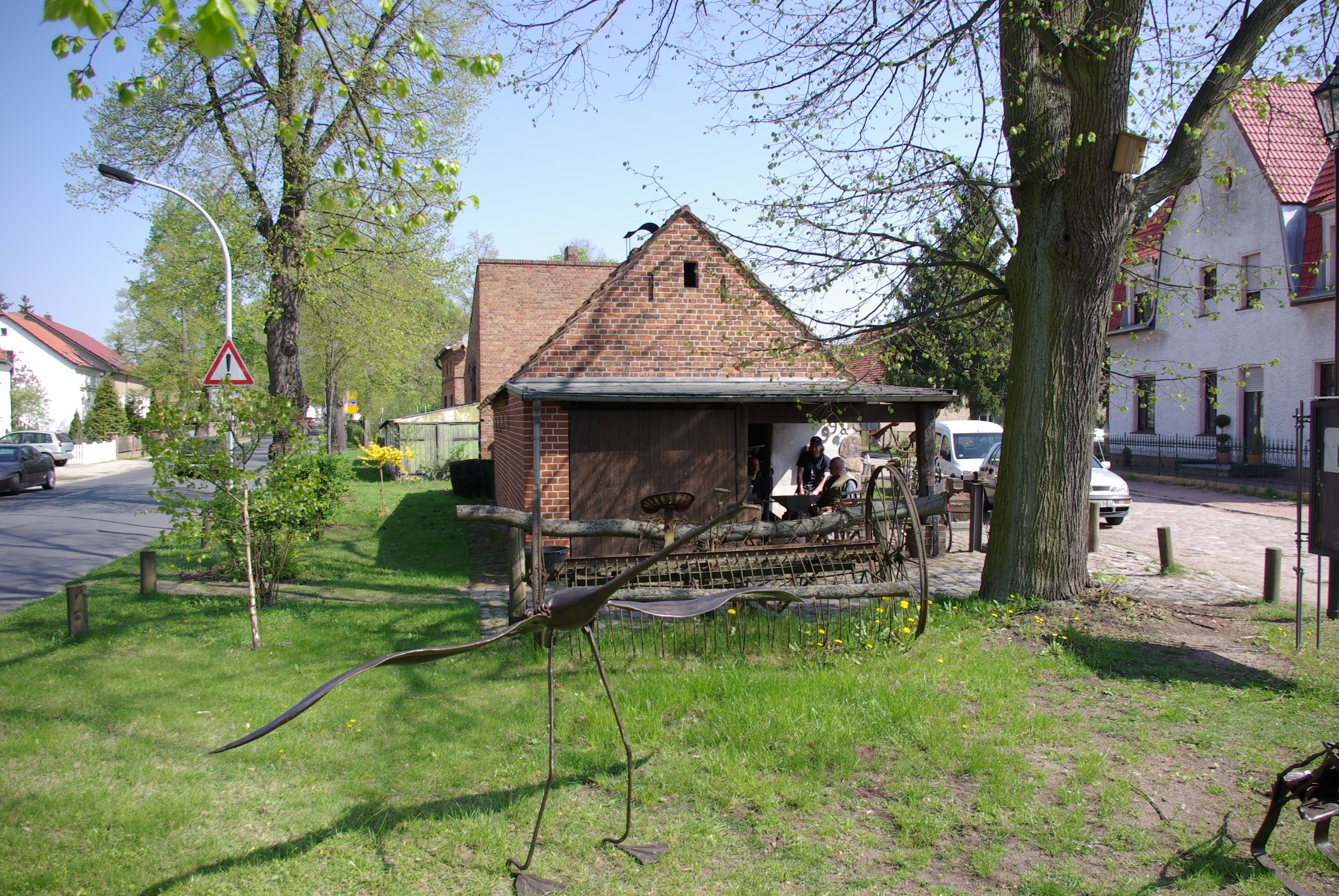 Blankenfelde-Mahlow in Brandenburg. Die Dorfschmiede geht wahrscheinlich auf das Jahr 1540 zurück. Die Schmiede ist mit den Ausrüstungsgegenständen denkmalgeschützt.